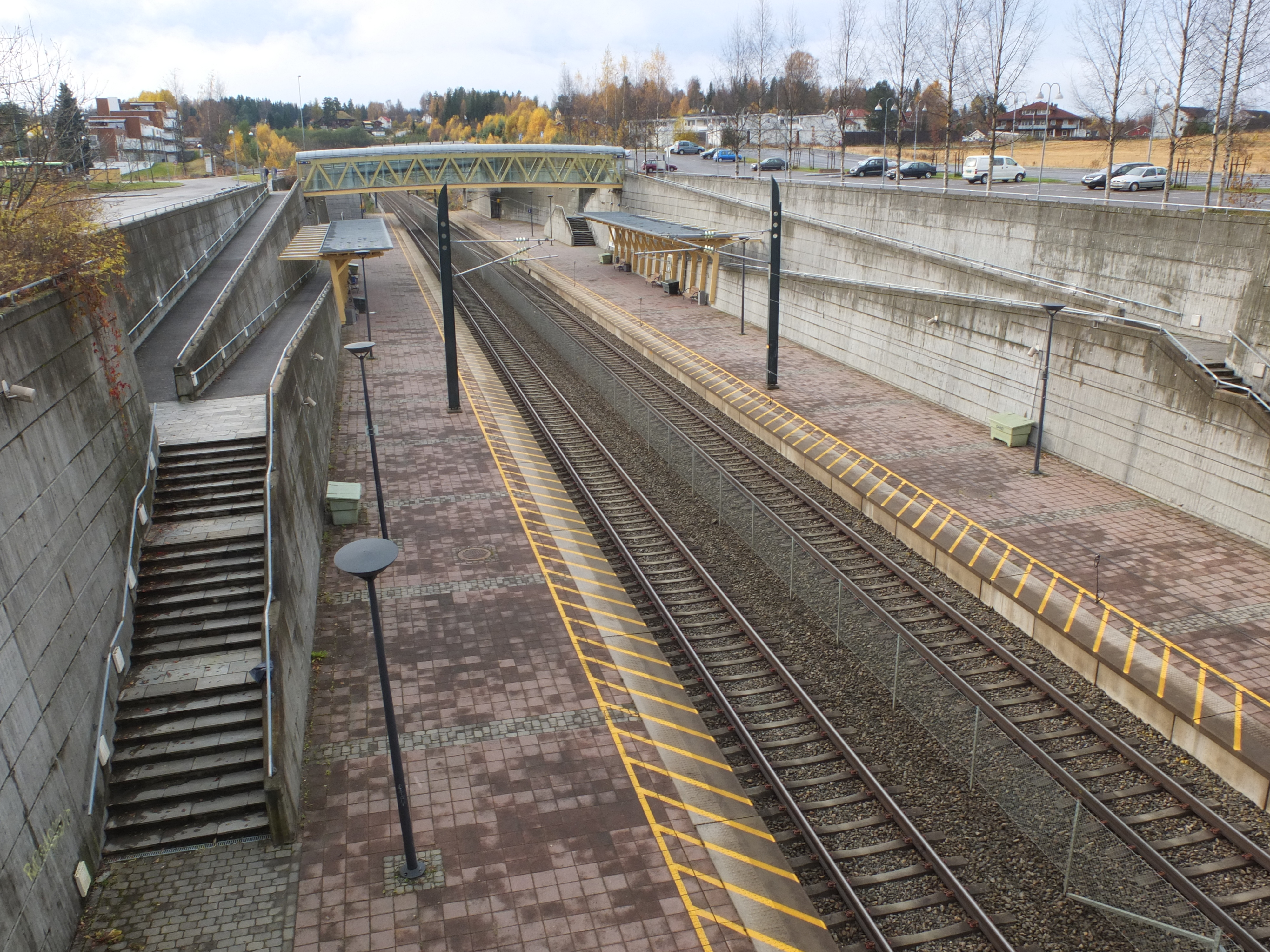 Eidsvoll verk stasjon